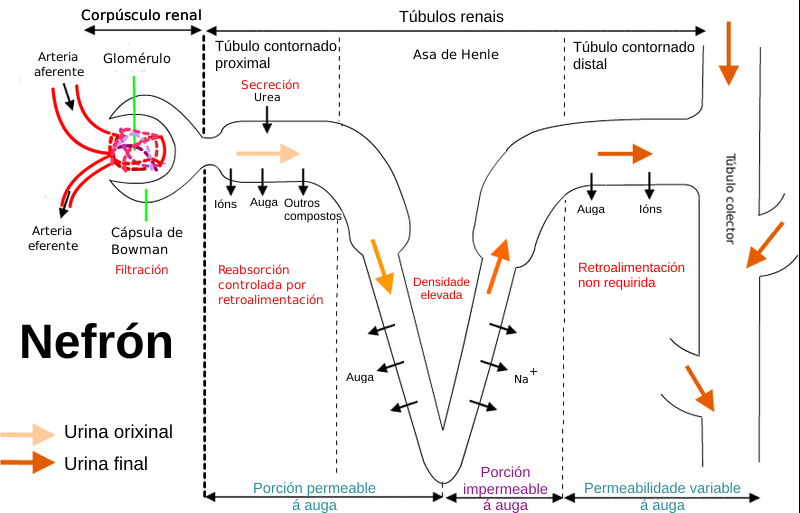 Esquema do funcionamento dun nefrón renal